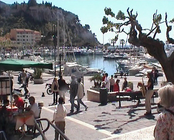 Cassis am Hafen